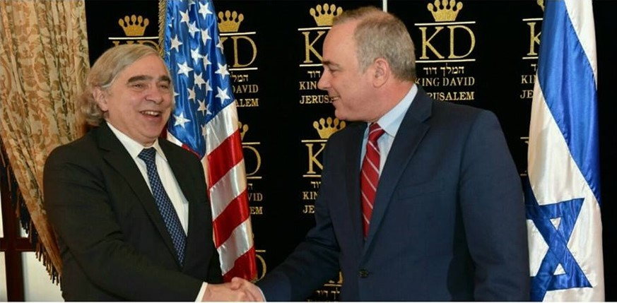 במלון קינג דיוויד, ירושלים